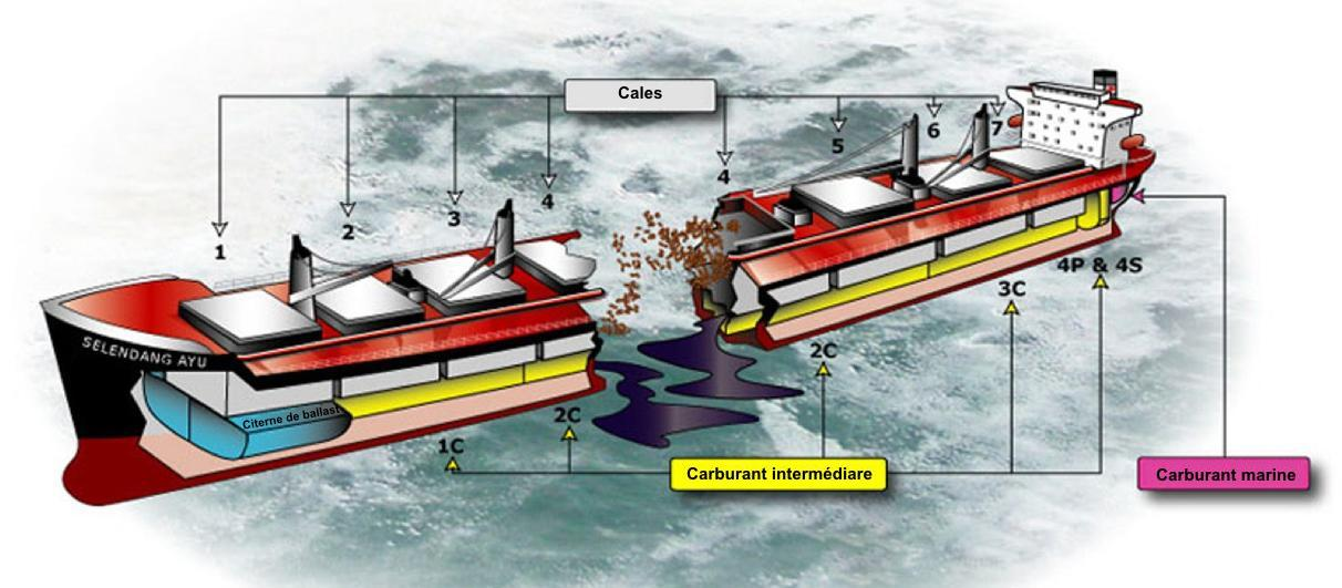 Version de Image:Seledang_Ayu.jpeg en français